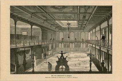 Das neue Schwimmbad in Stuttgart, Holzstich von Wittmann und Stahl